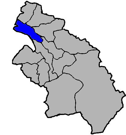 中華民國臺灣省新竹縣竹北市，KJ (talk)繪製。